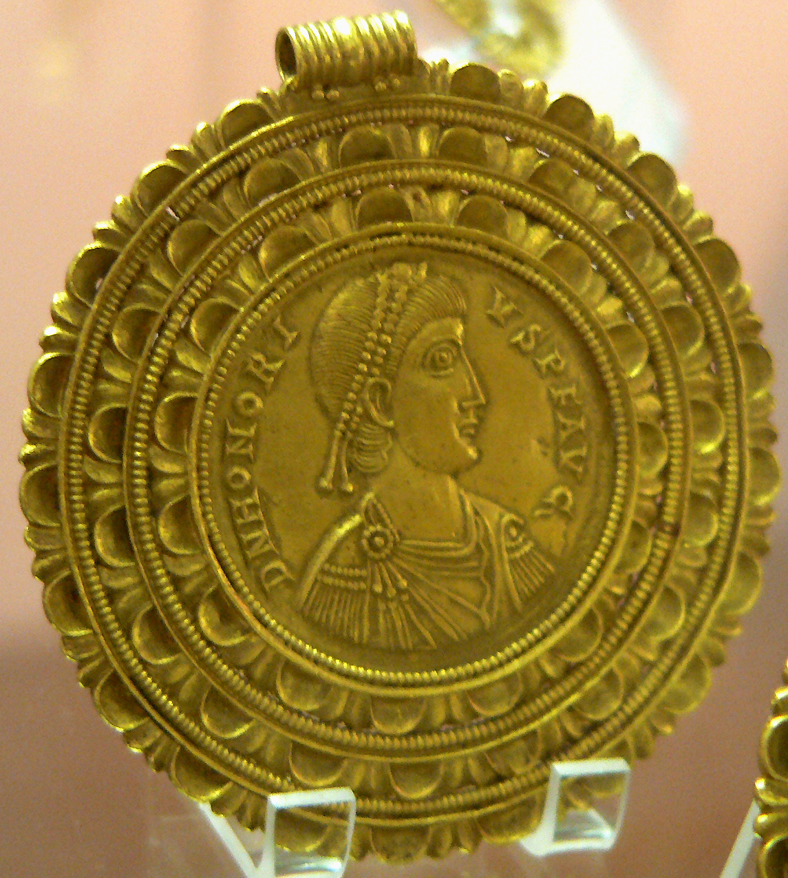 Médaillon d'Honorius Médaillon d'Honorius (384-423), frappé à Ravenne. Il faisait partie, avec le médaillon de Galla Placidia, d'un trésor monétaire, le Trésor de Velp (Pays-Bas), enfoui peu après 425 et découvert fortuitement en 1715. Ces deux médaillons d'or aux riches montures, étaient montées en collier. Acquis en 1822